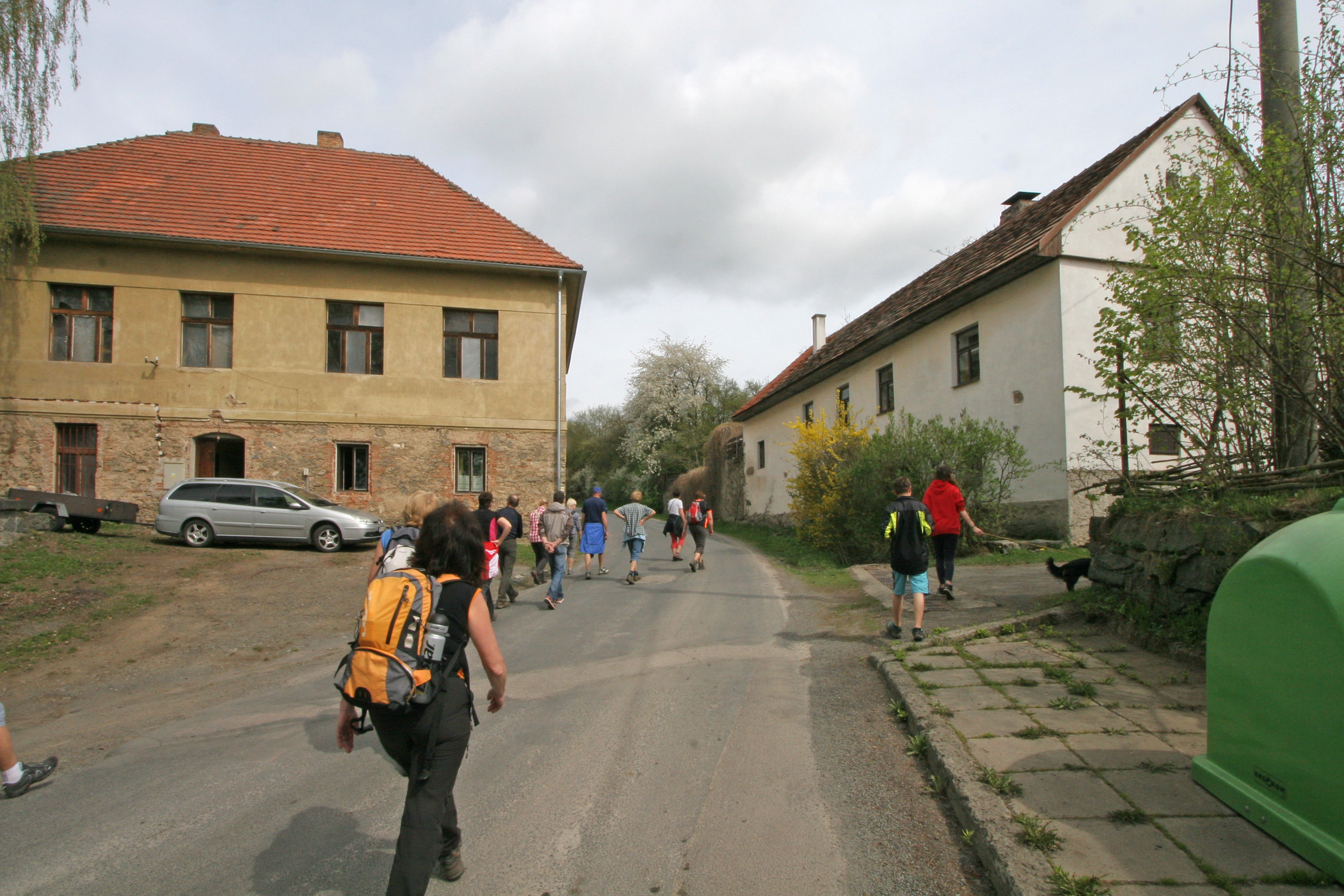 Kaplička v Teletíně